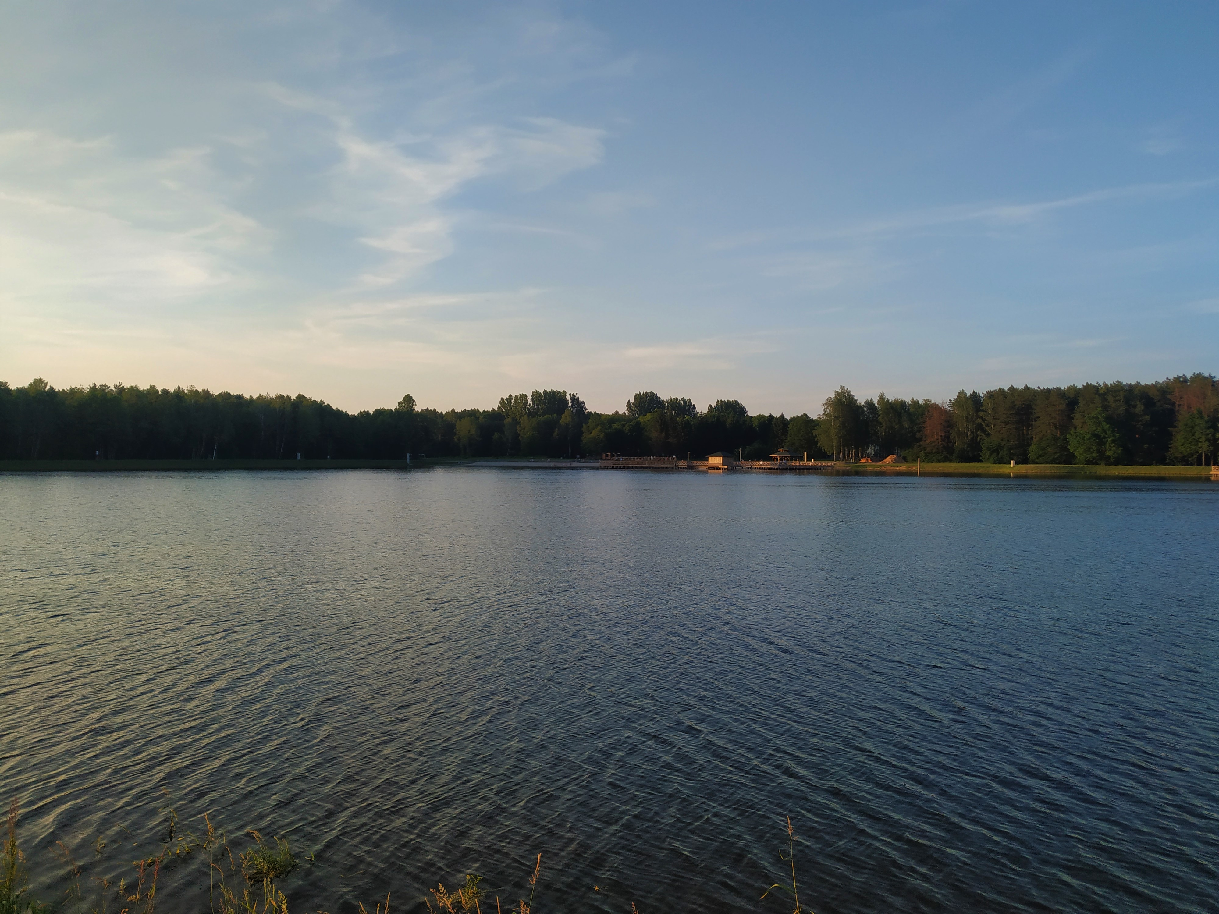 Zalew Zimna Woda w Łukowie